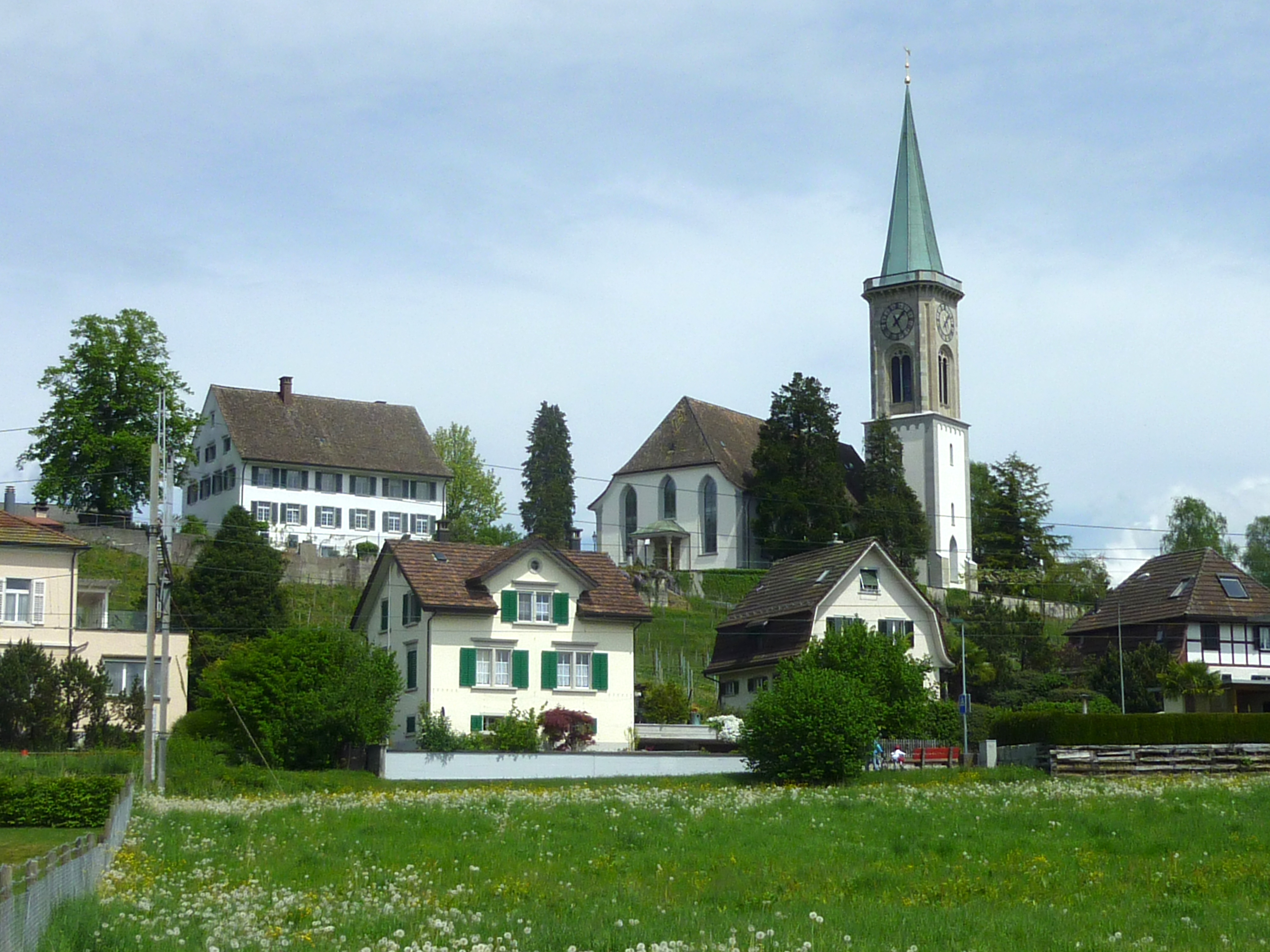 Kirch Stäfa ZH